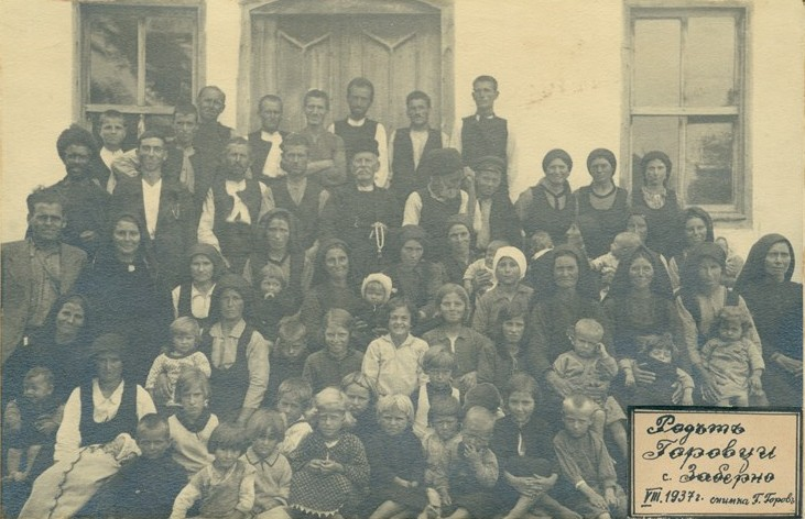 Родът Горовци от с. Заберново, Бургаско, август 1937 г.